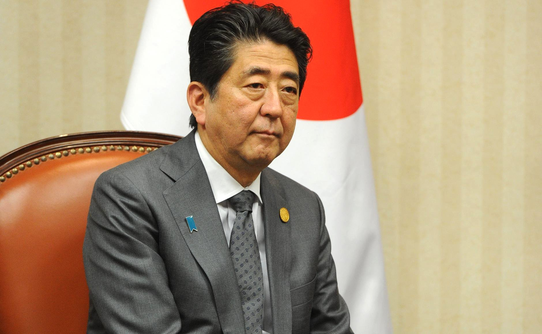 Премьер-министр Японии Синдзо Абэ во время встречи с Президентом России Владимиром Путиным